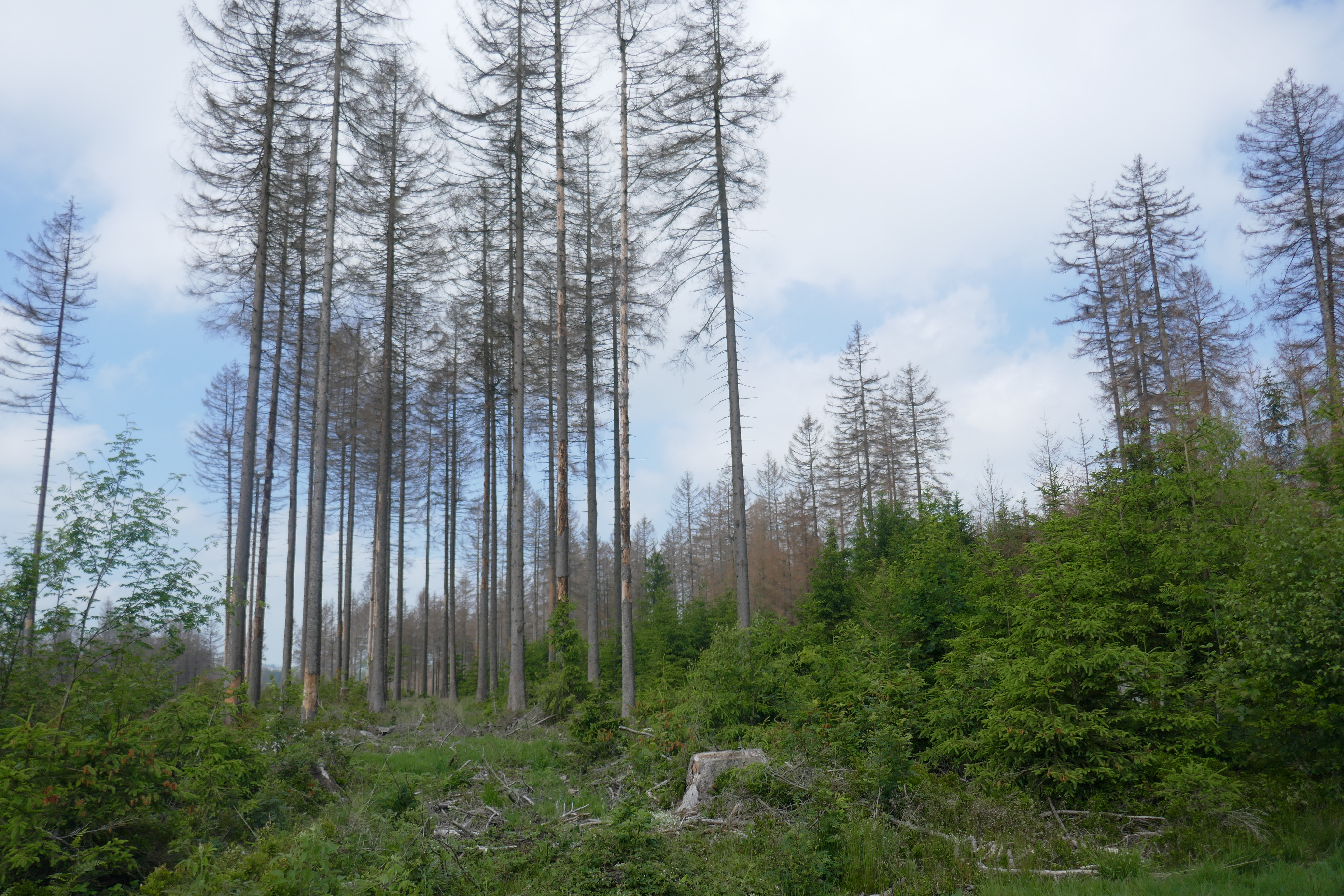 Fichtensterben am Eggeweg zwischen Herbram-Wald und Asseln